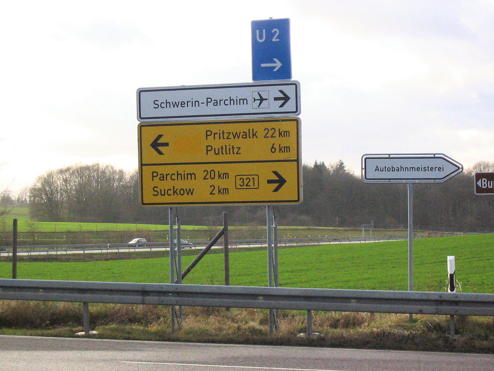 Autobahnabfahrt Suckow von der A24 auf die B321 in Suckow/Putlitz (Landesgrenze verläuft durch diese Abfahrt), auf dem Schild zu erkennen: Nach Abstufung der Straße nach Putlitz wurde die 321 überklebt